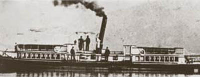 Ausflugsdampfer